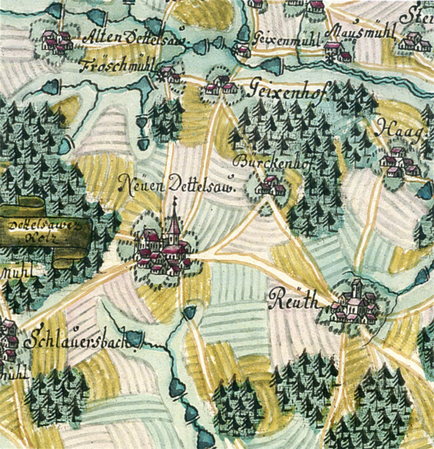 Ausschnitt aus der "Vetter-Karte": Neuendettelsau und Umgebung